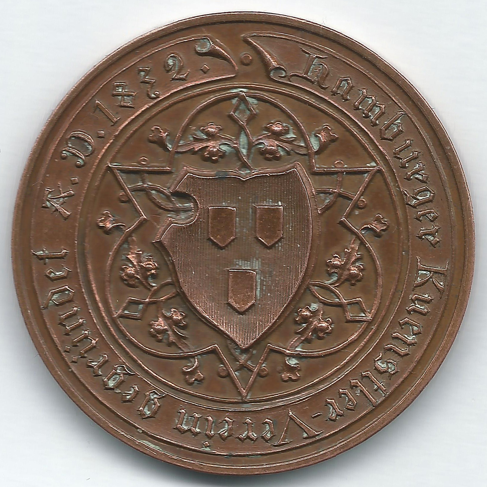 Medaille aus Bronze zum 25-jährigen Stiftungsfest des Hamburger Künstlervereins (19. September 1857). Entwurf Hermann Wilhelm Soltau, geprägt von Heinrich Lorenz (vermutlich in der Königlichen Münze zu Altona, dessen Leiter Lorenz zu diesem Zeitpunkt war). Durchmesser: 3,3 cm. Gewicht 13,6 Gramm. (Scan)